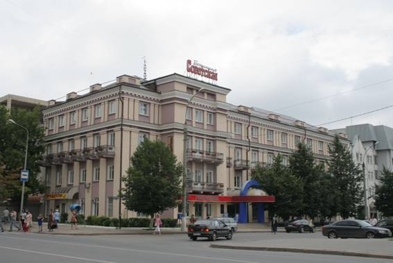 Липецк. Гостиница "Советская" на углу улиц Советской и Ворошилова